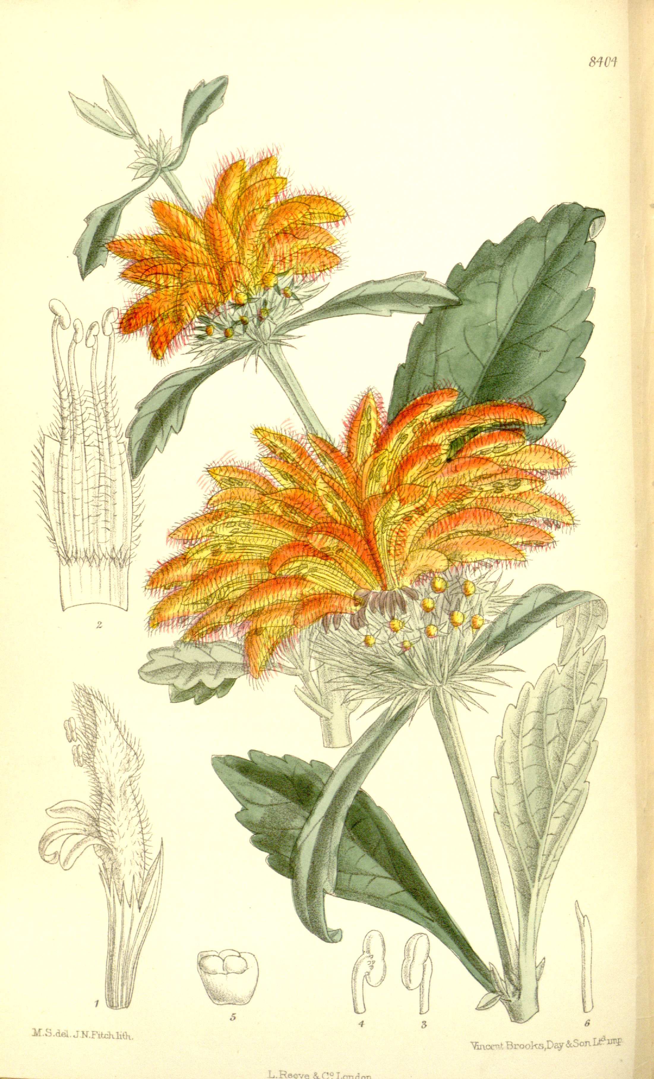 Leonotis dysophylla (= Leonotis ocymifolia var. raineriana), Lamiaceae